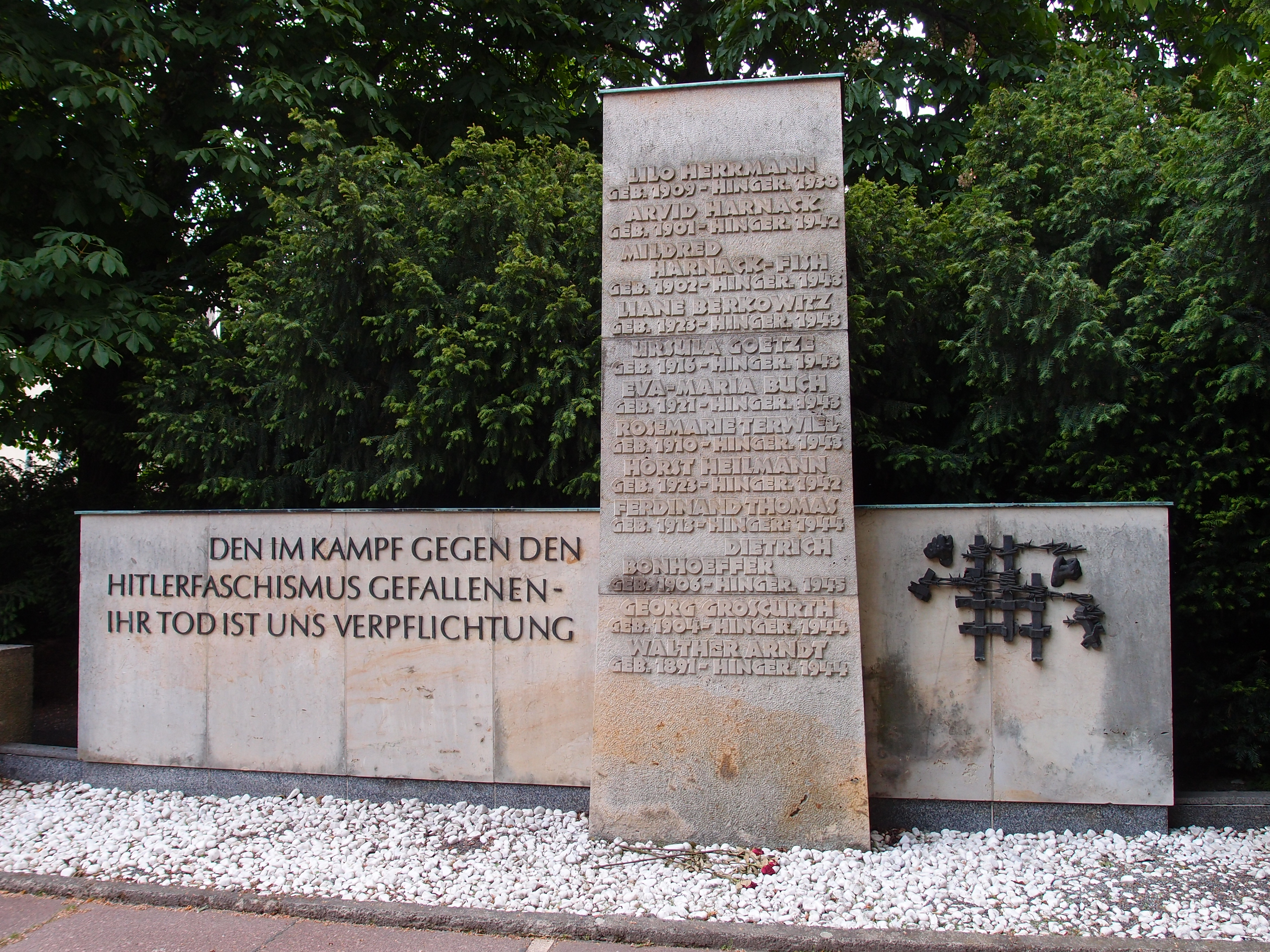 Ursula Goetze (1916-1943), Studentin und Widerstandskämpferin gegen den Nationalsozialismus; Denkmal in Berlin-Mitte, Humboldtuniversität